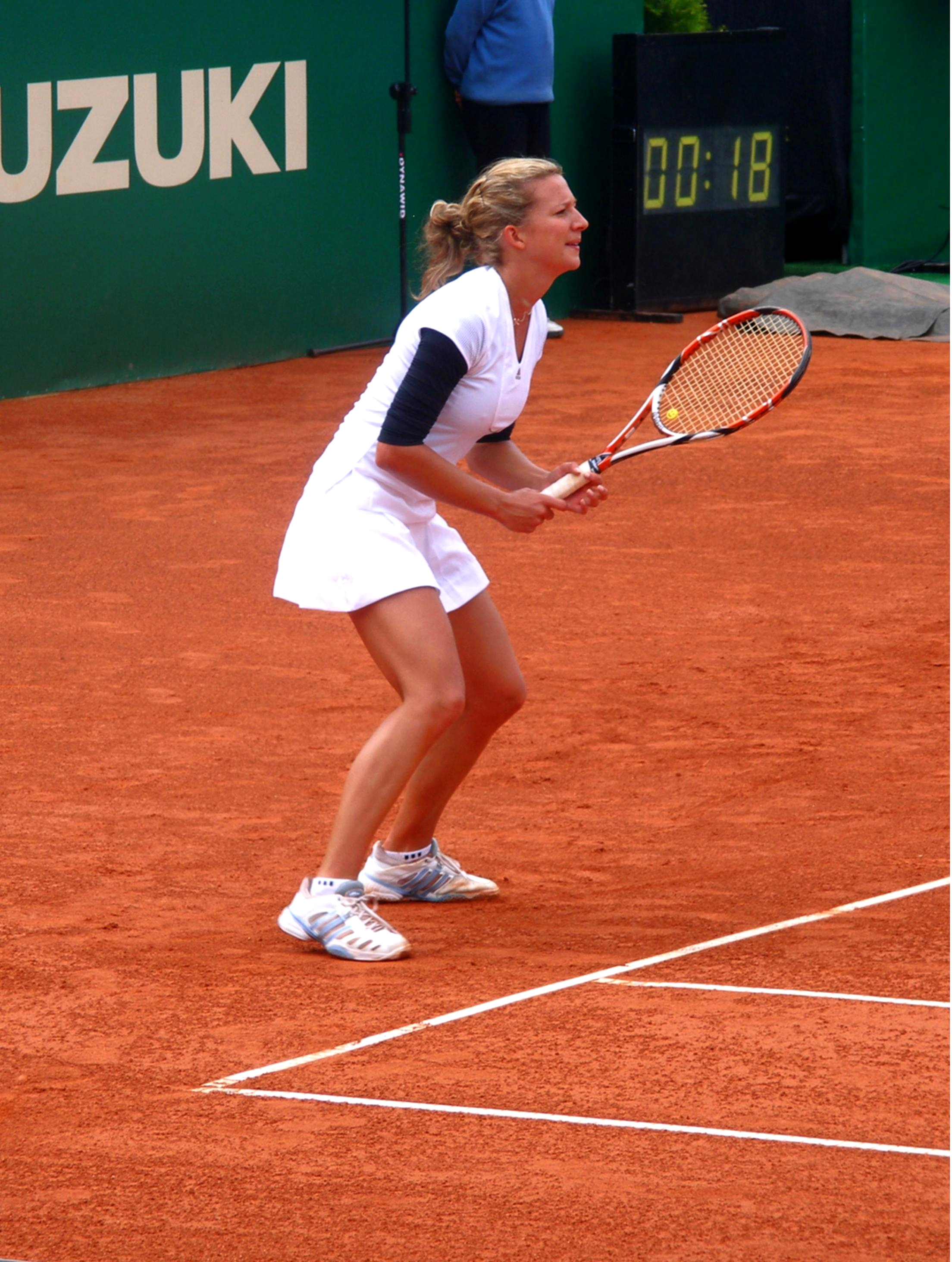 Marta Domachowska podczas meczu z Jeleną Dementiewą, mecz o 3 miejsce, Suzuki Warsaw Masters 2008